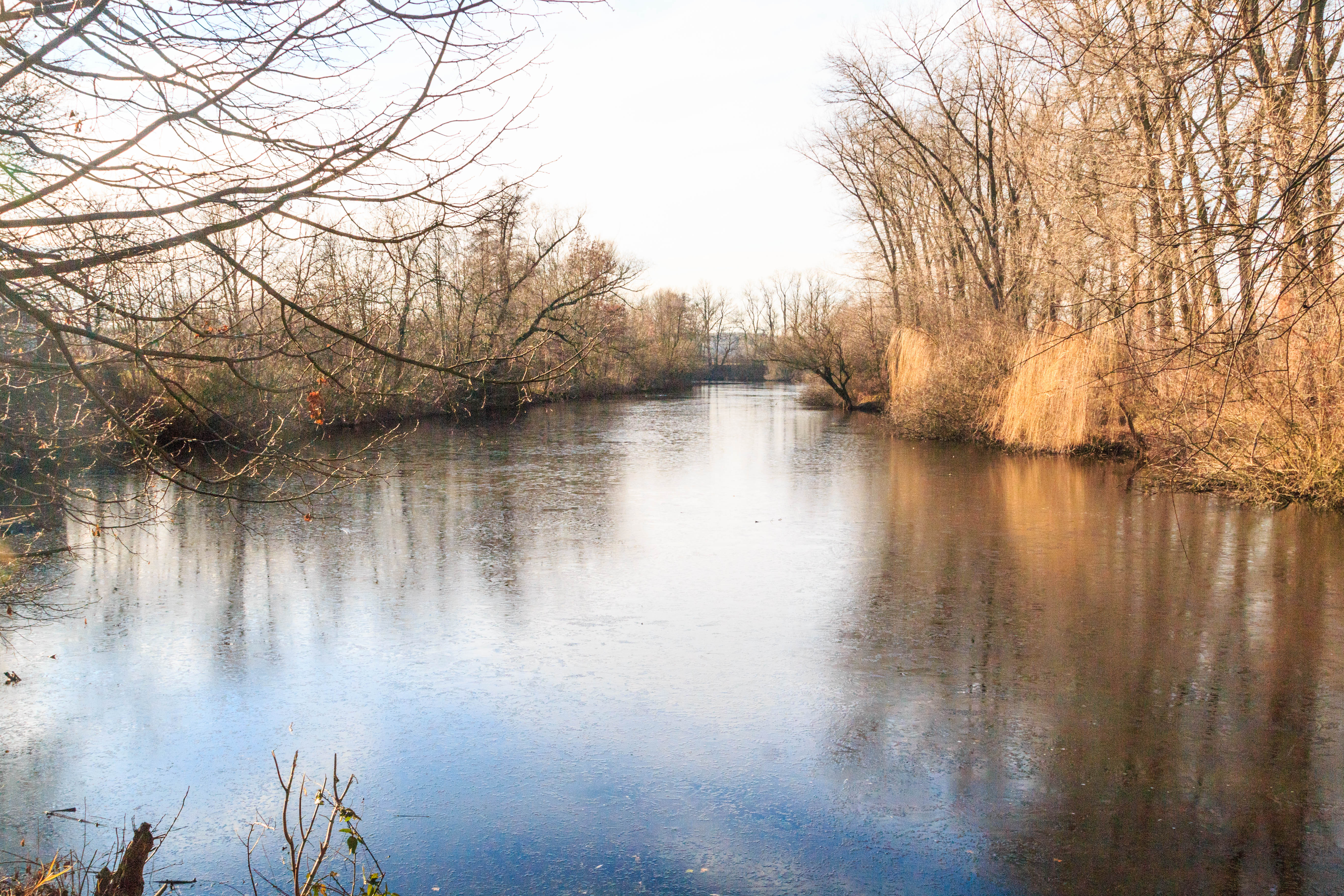 Mrtvé rameno Labe u Němčic Project: Vodstvo